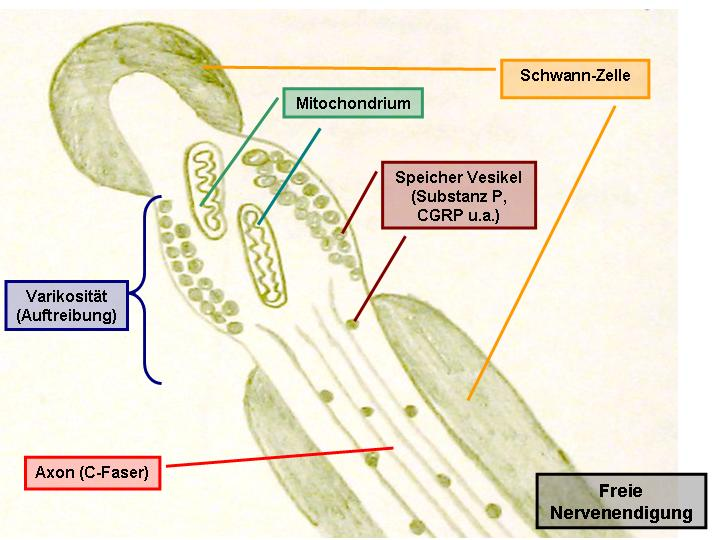 Nozizeptor: Schema